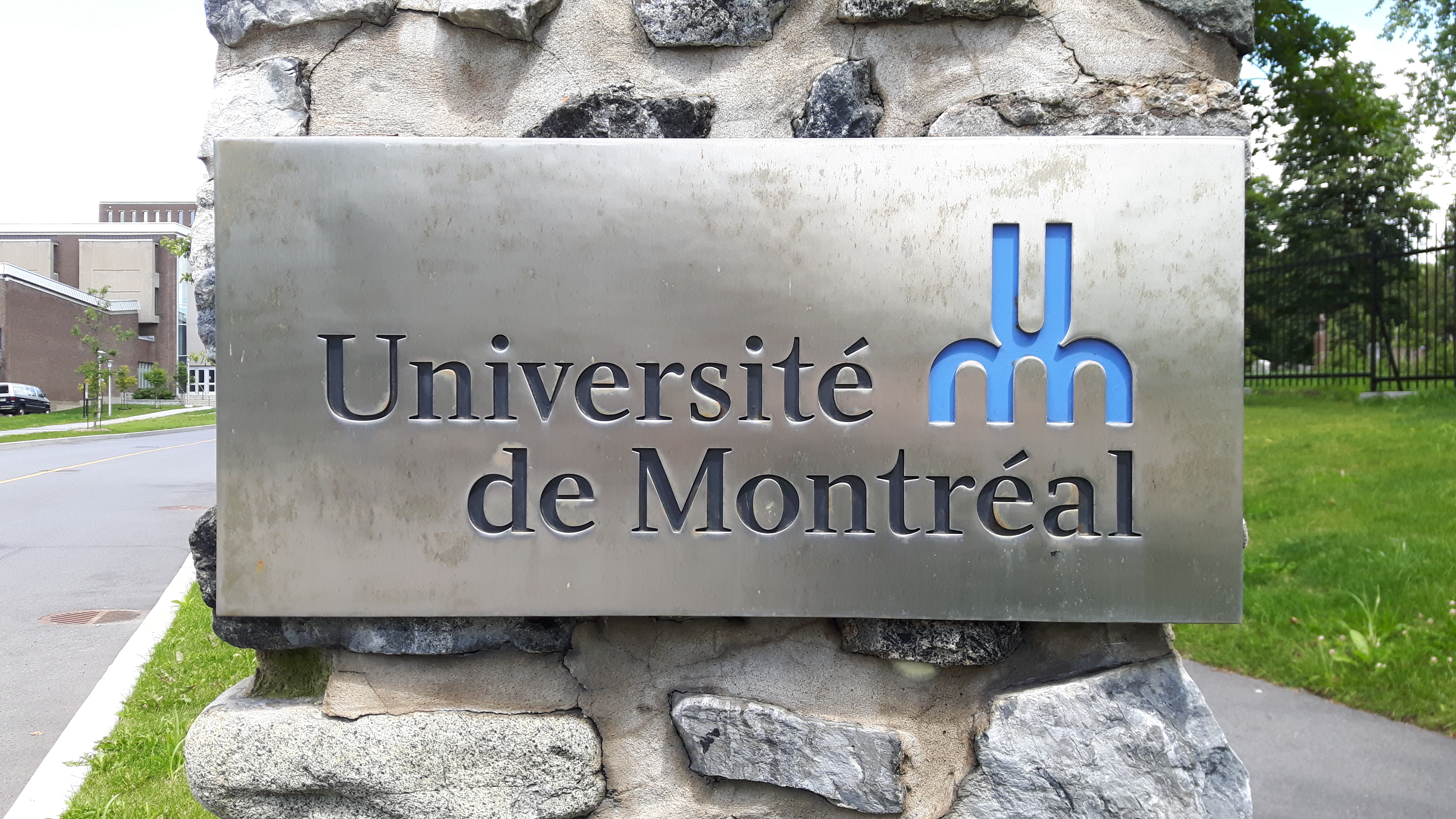 Plaque de l'Université de Montréal.